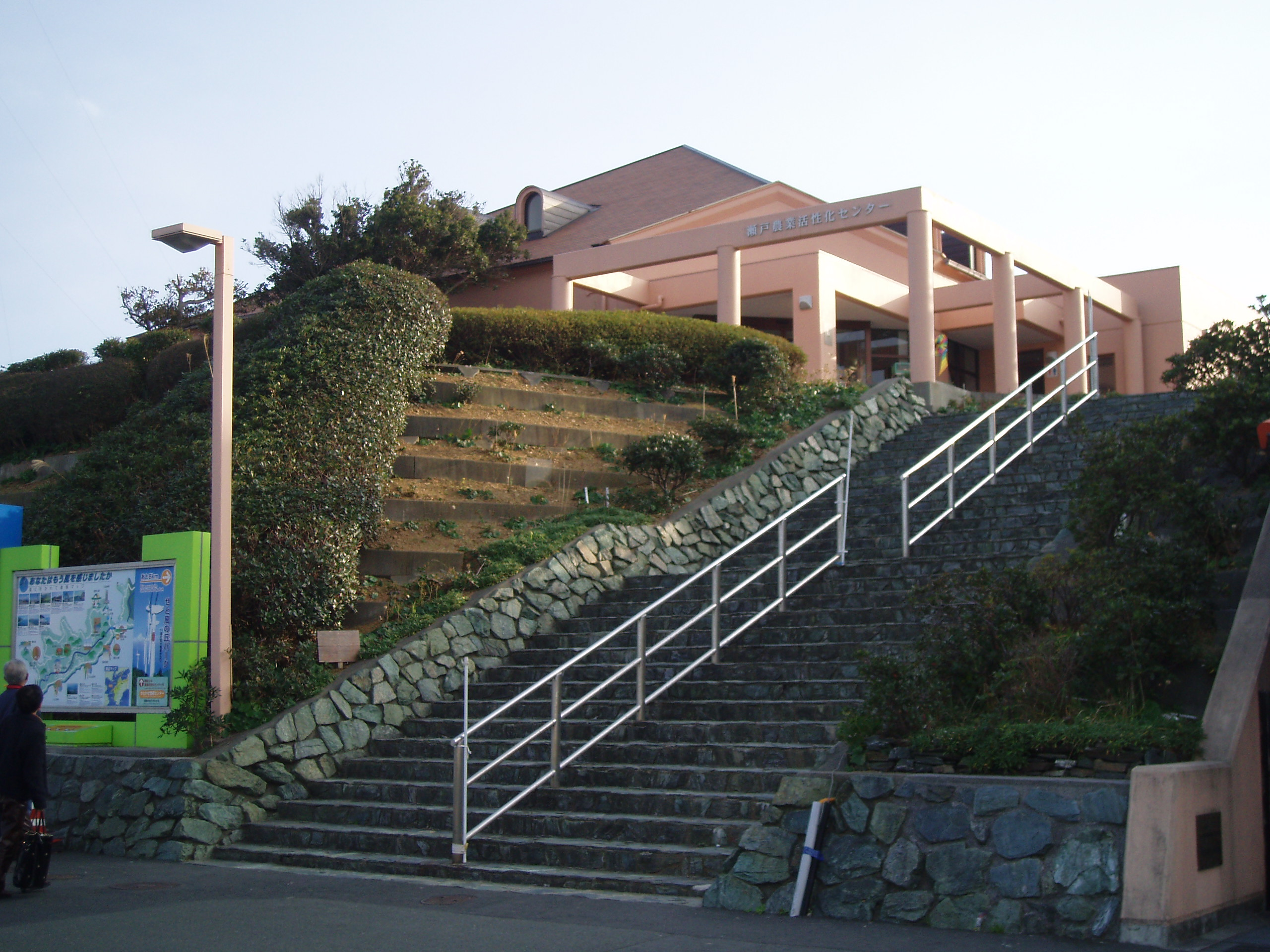 Seto Agriculture Park in Ikata, Ehime, Japan